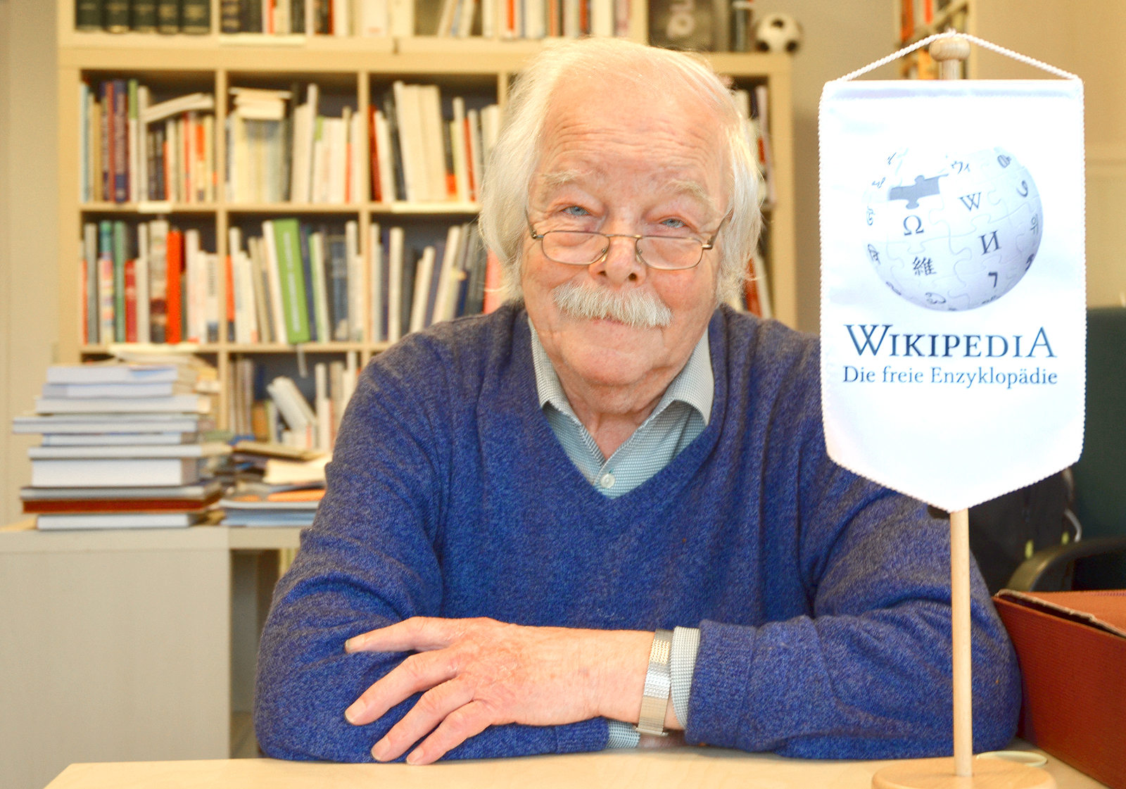 Überzeugt von den Möglichkeiten der Wikipedia und den Mitmach-Portalen der Stiftung Wikmedia Foundation zum Wohle der Allgemeinheit: Otto Stender, ehemals selbständiger Buchhändler und Initiativ-Gründer der Ehrenamtlichen-Initiative Mentor – Die Leselernhelfer ...